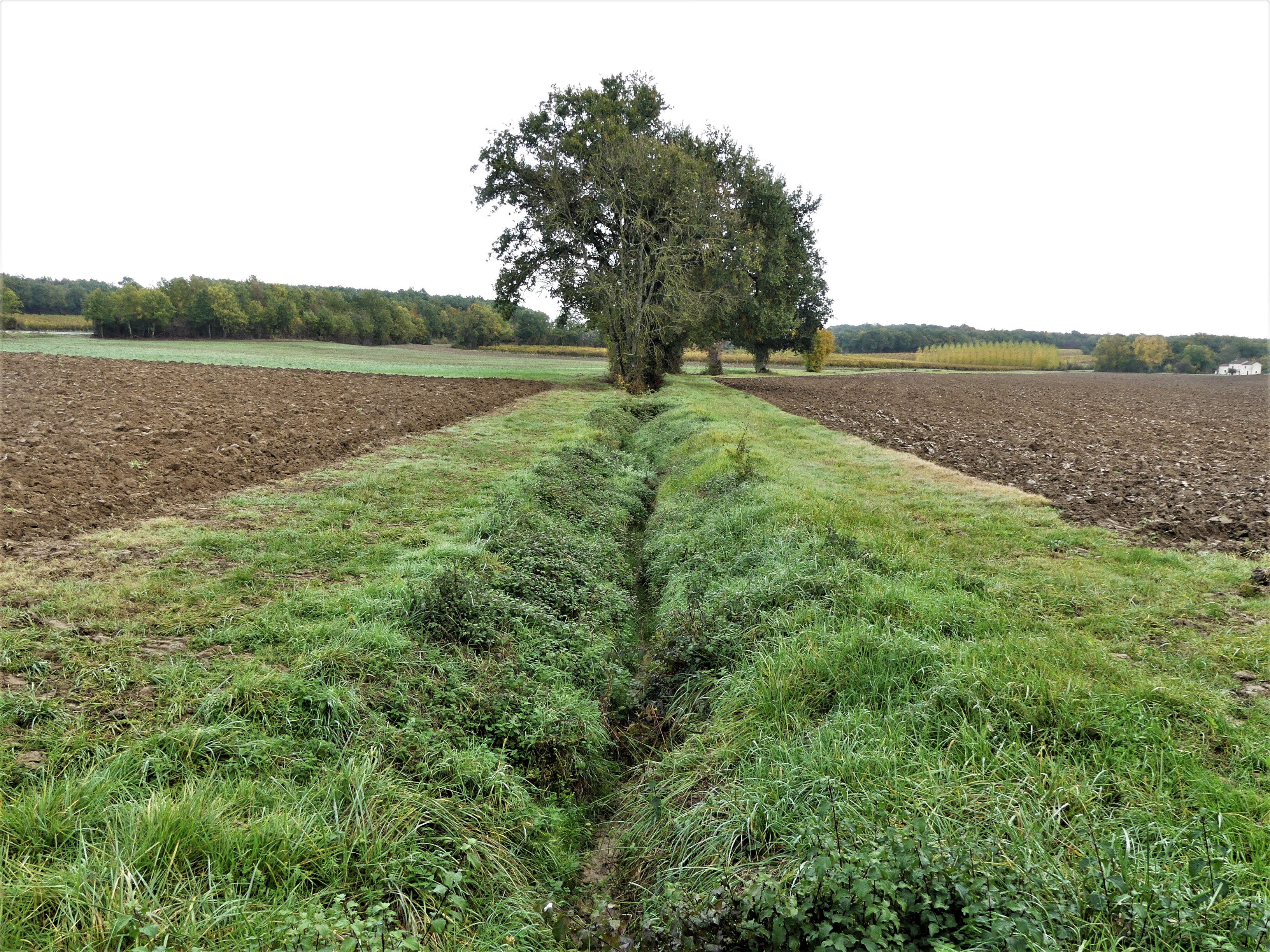 L'Escourou à sec en limites de Mescoules (à gauche) et Saint-Julien-d'Eymet (à droite), Dordogne, France. Vue prise en direction de l'amont, entre les lieux-dits la Pleyssade et Jean Géraud.